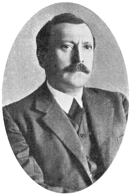 Eugenio Arbones Castellanzuelo (1884-1936)